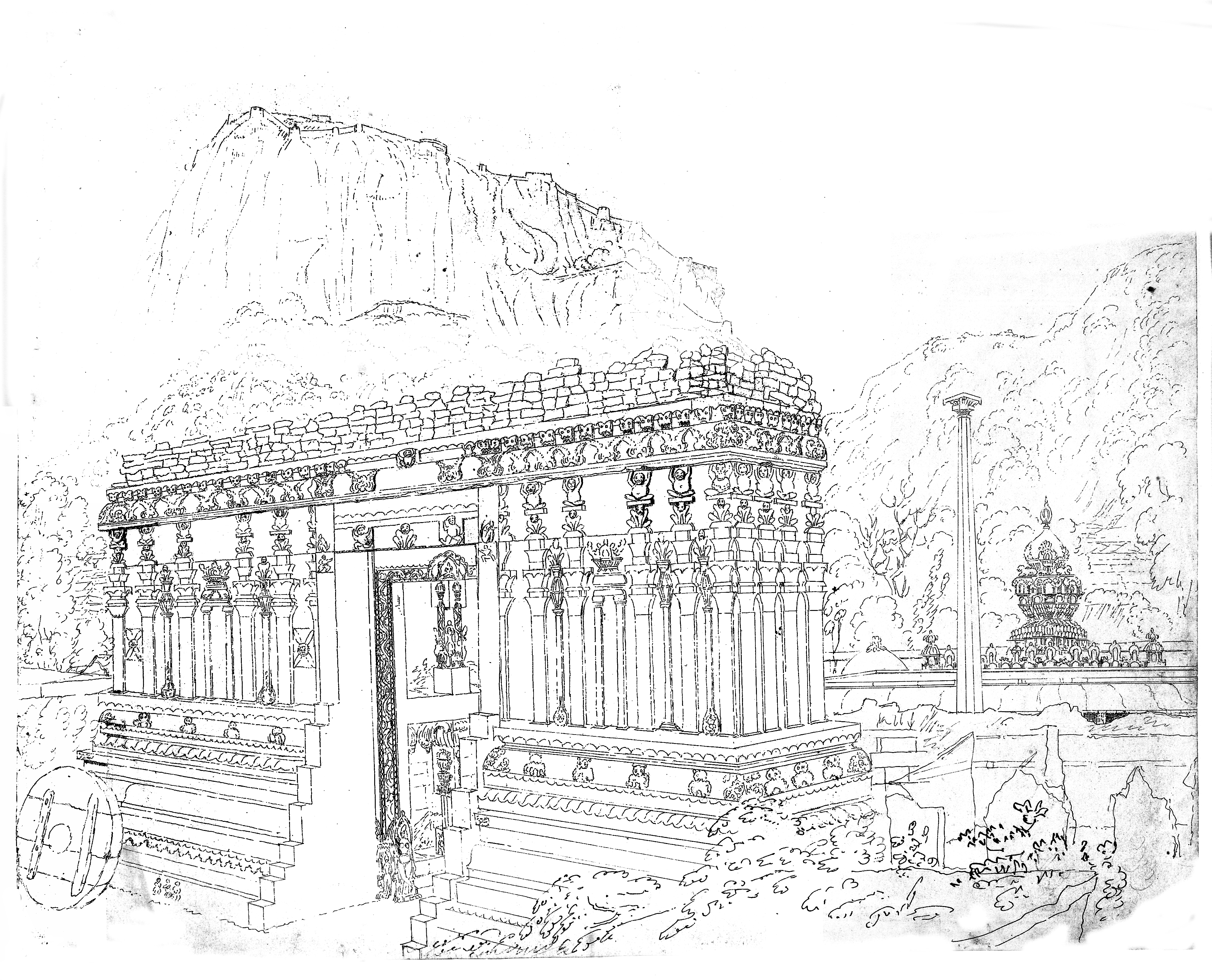 Bhoganandishwara temple, Nandi Town